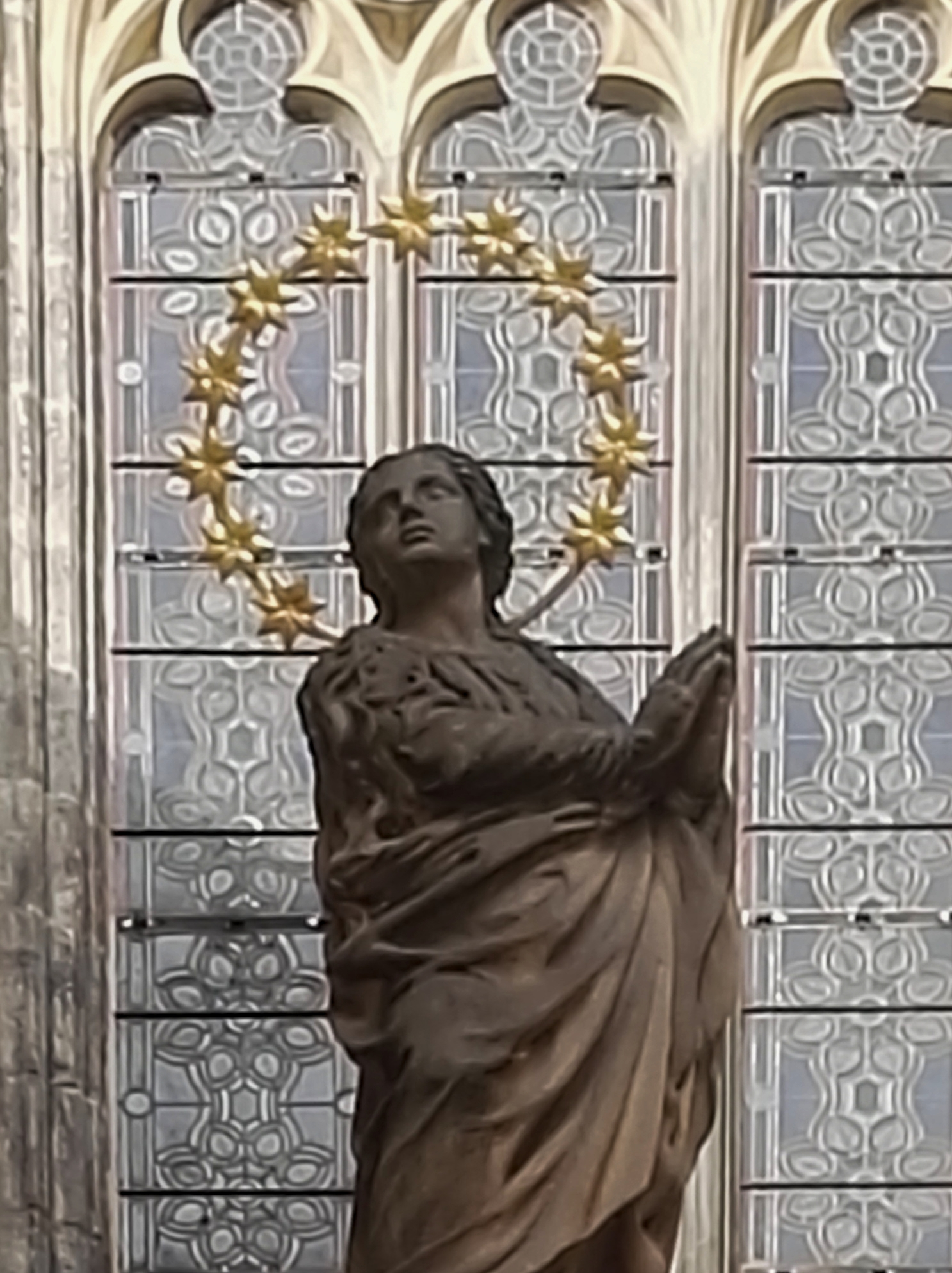 Koruna 12 hvězd na soše Immaculaty u Týnského chrámu, Praha